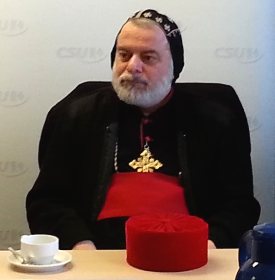 Erzbischof Mor Timothy Mosa Alshamany vom Mor-Matai-Kloster